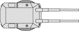 Immagine laterale torrtta A